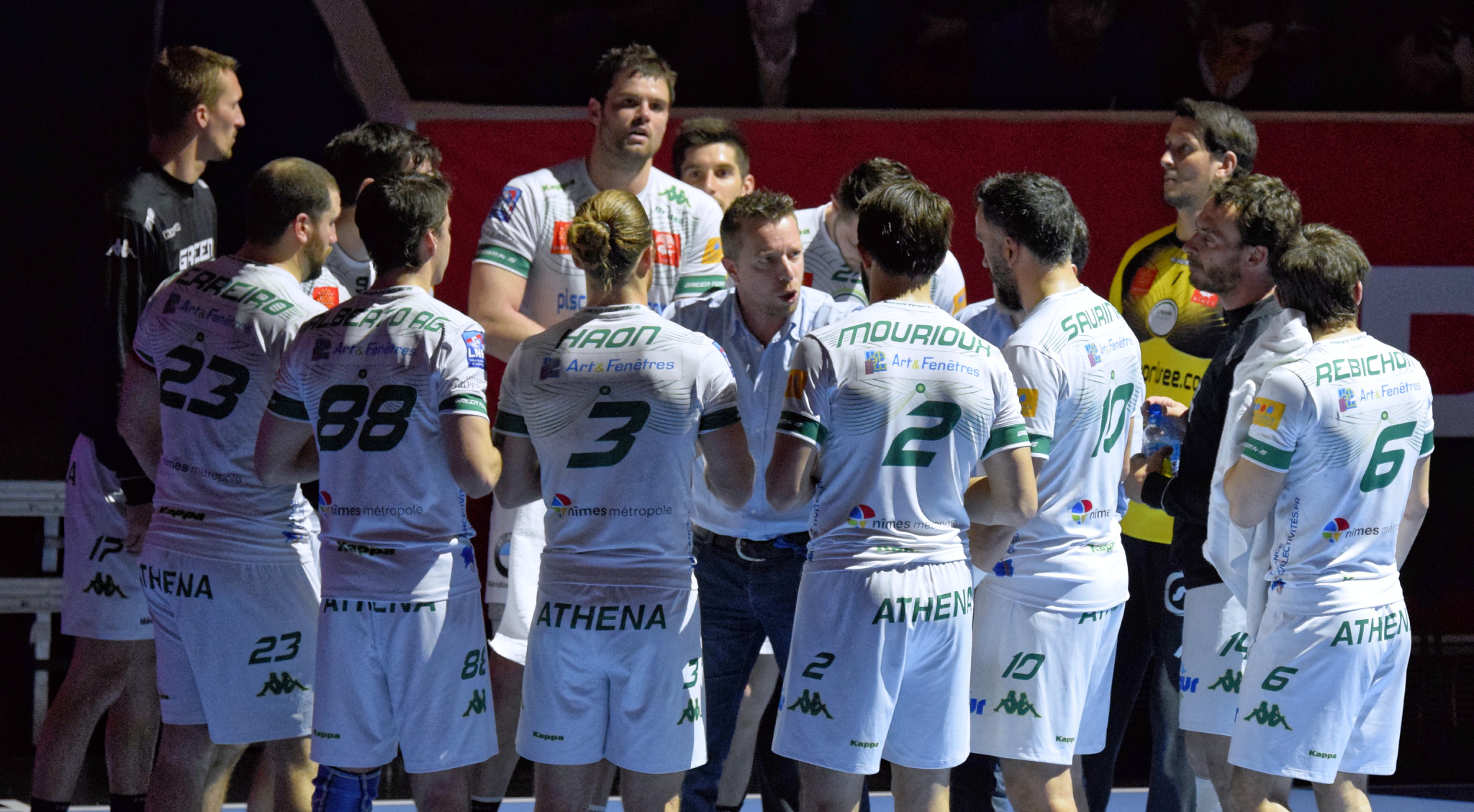 Match de la 18e journée de LNH entre le PSG Handball et l'USAM Nîmes. A Coubertin, le 11 mars 2015.